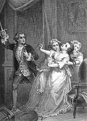 Gustave Staal (1817–1882): Illustration zum Drama "Eugénie" (1767) von Pierre-Augustin Caron de Beaumarchais (1632–1799).